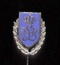 Bayerisches Infanterie-Leib-Regiment (München), Abzeichen des Regimentsvereins